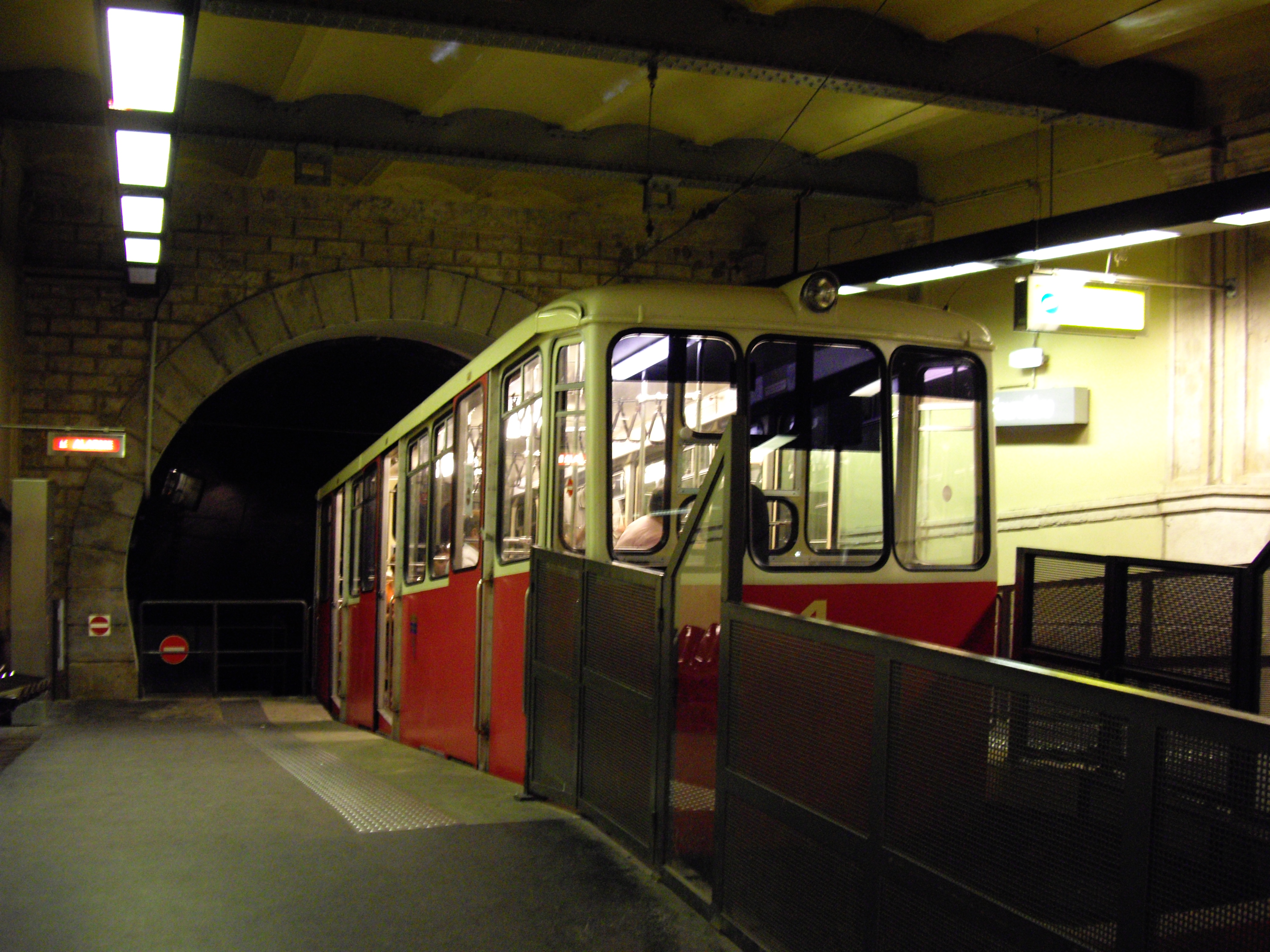 Le funiculaire Fourvière est à son terminus, Fourvière.